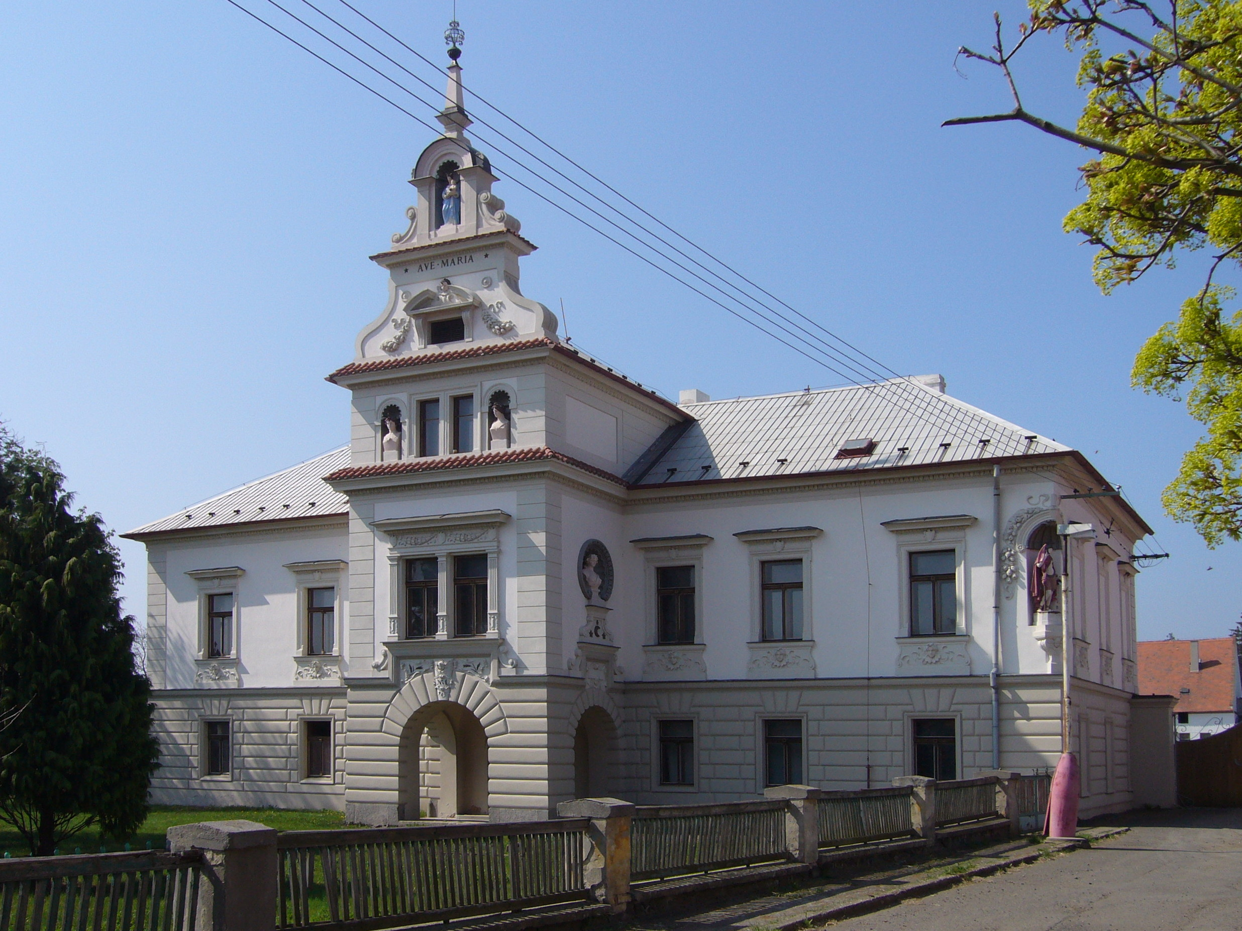 Zámek Veliká Ves Veliká Ves (okres Chomutov).